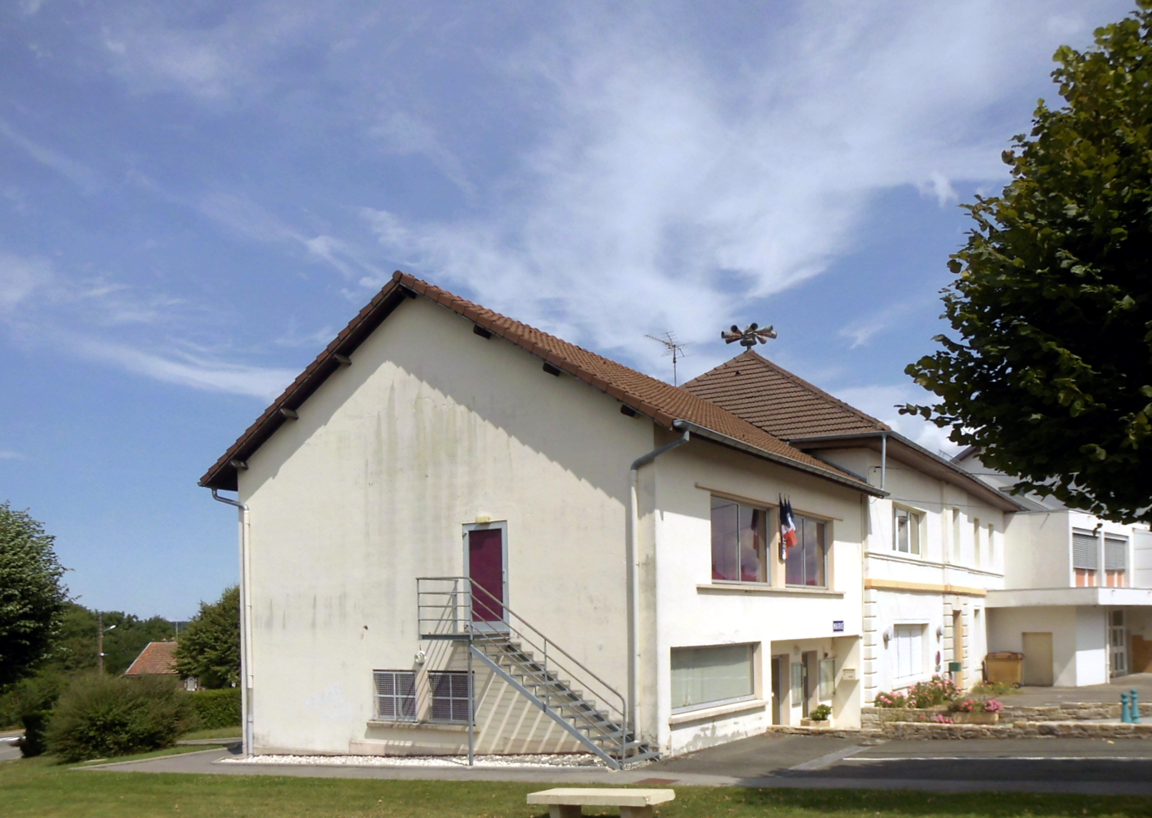 La mairie de Blamont